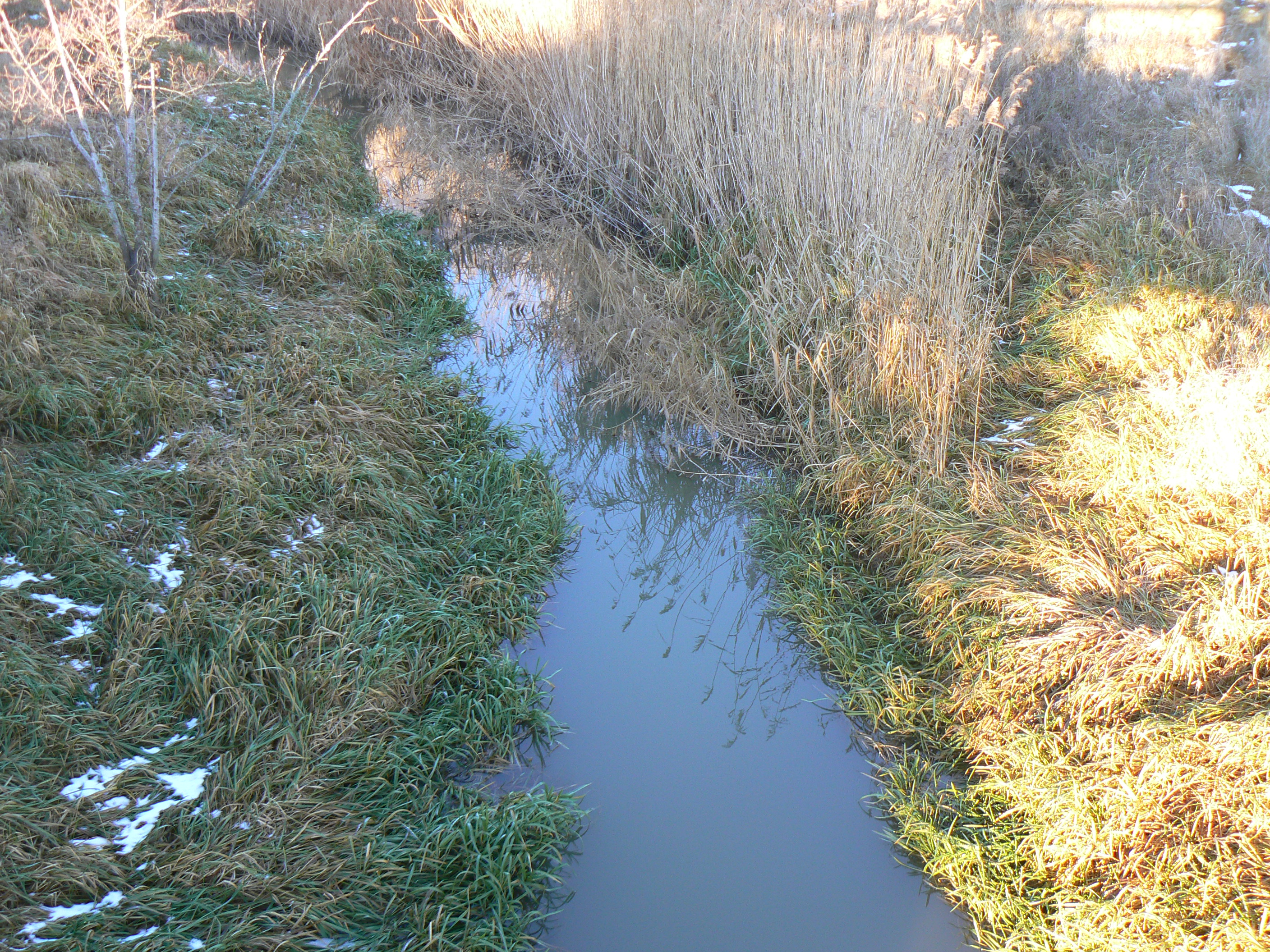 Vårdsbergsån ("Vårdsberg river") in Östergötland, Sweden. Photo taken from the bridge of former Mellersta Östergötland Railway at Vårdsberg.